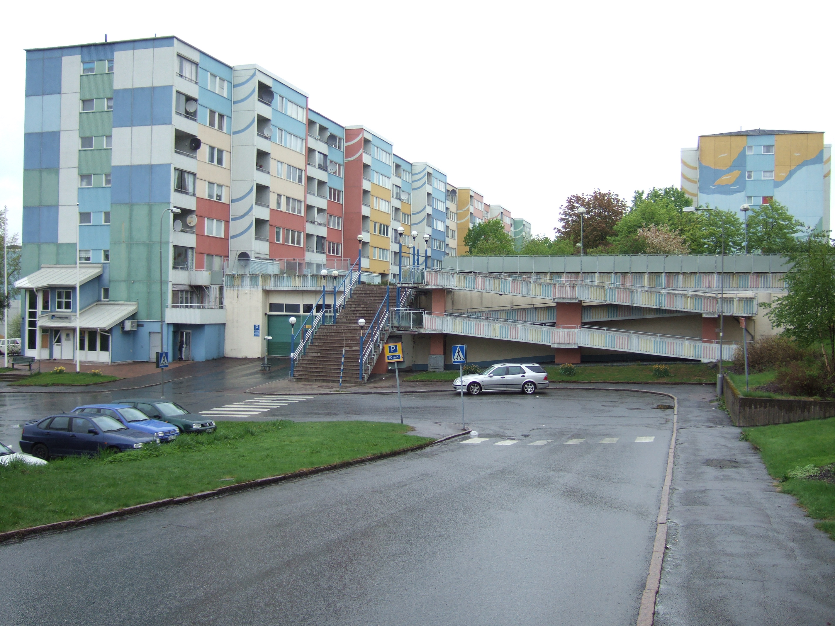 Stadsdelen Bergsjön i Göteborg, med Siriusgatan, sett mot norr.